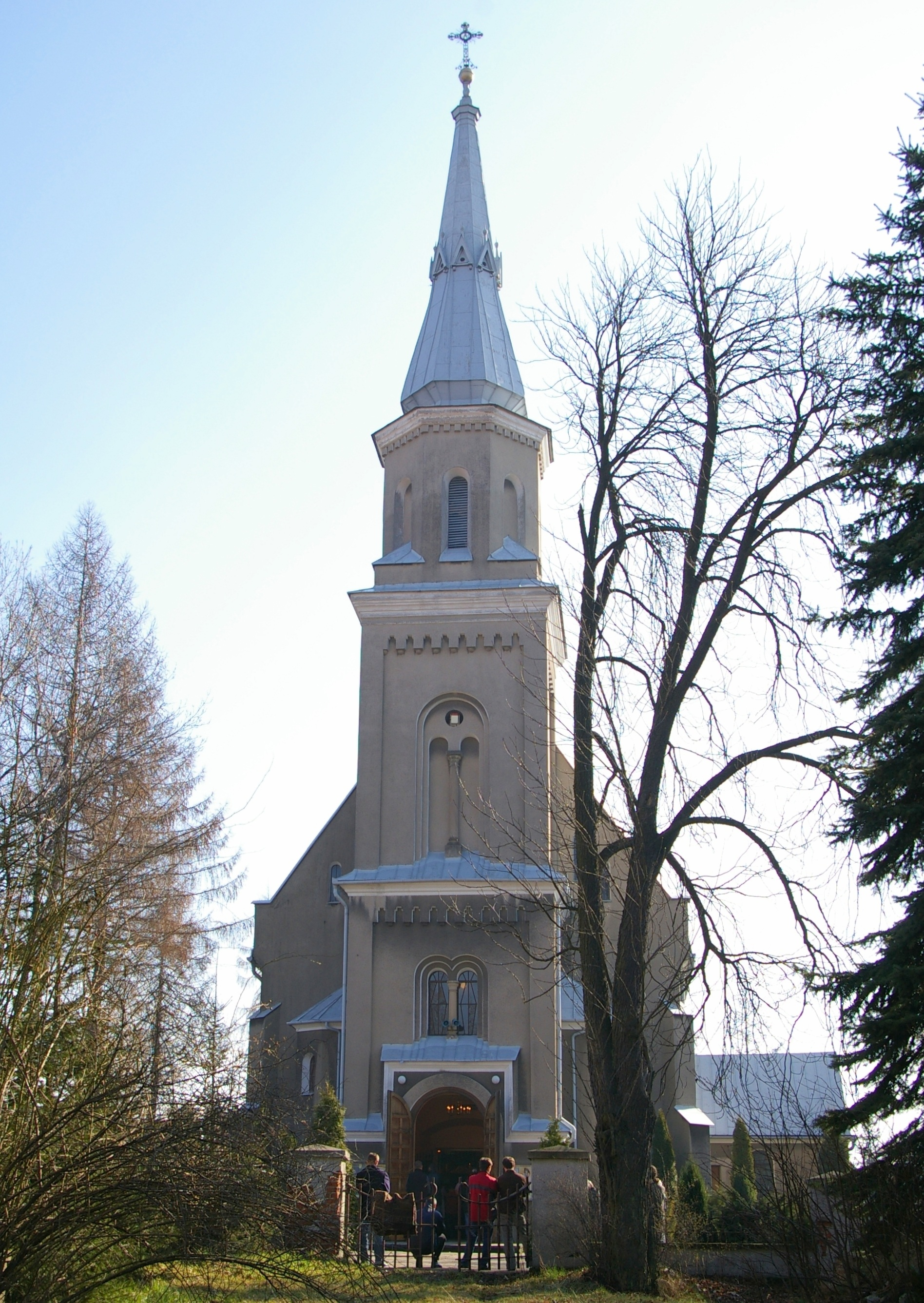 Gaj, ul. Maryjna 5 - rzymskokatolicki kościół parafialny pw. Narodzenia NMP (sanktuarium), 1626